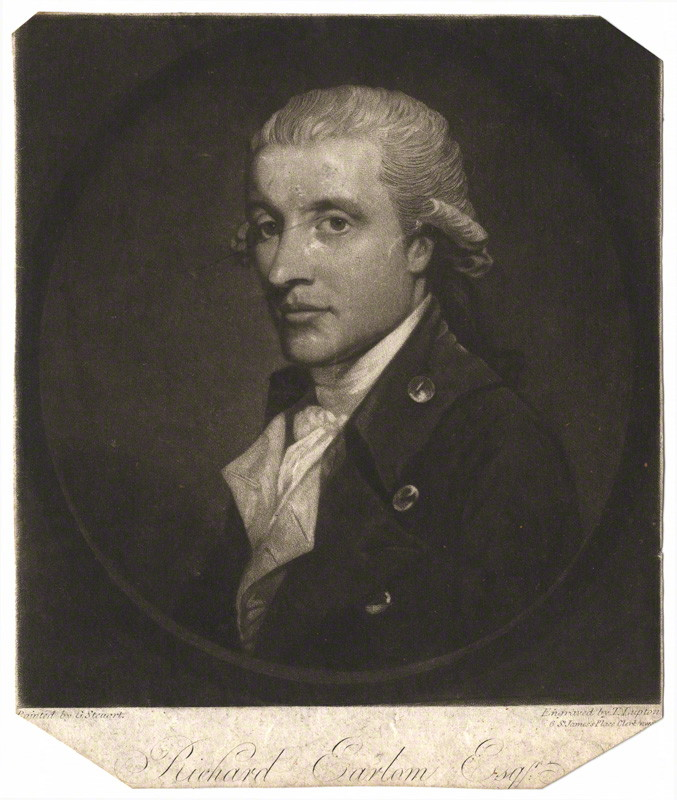 Портрет Richard Earlom выролненный Thomas Goff Lupton 1818г.